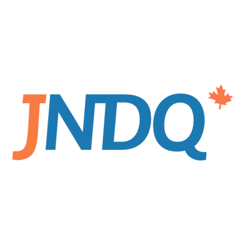 Logo des Jeunes néo-démocrates du Québec (JNDQ)